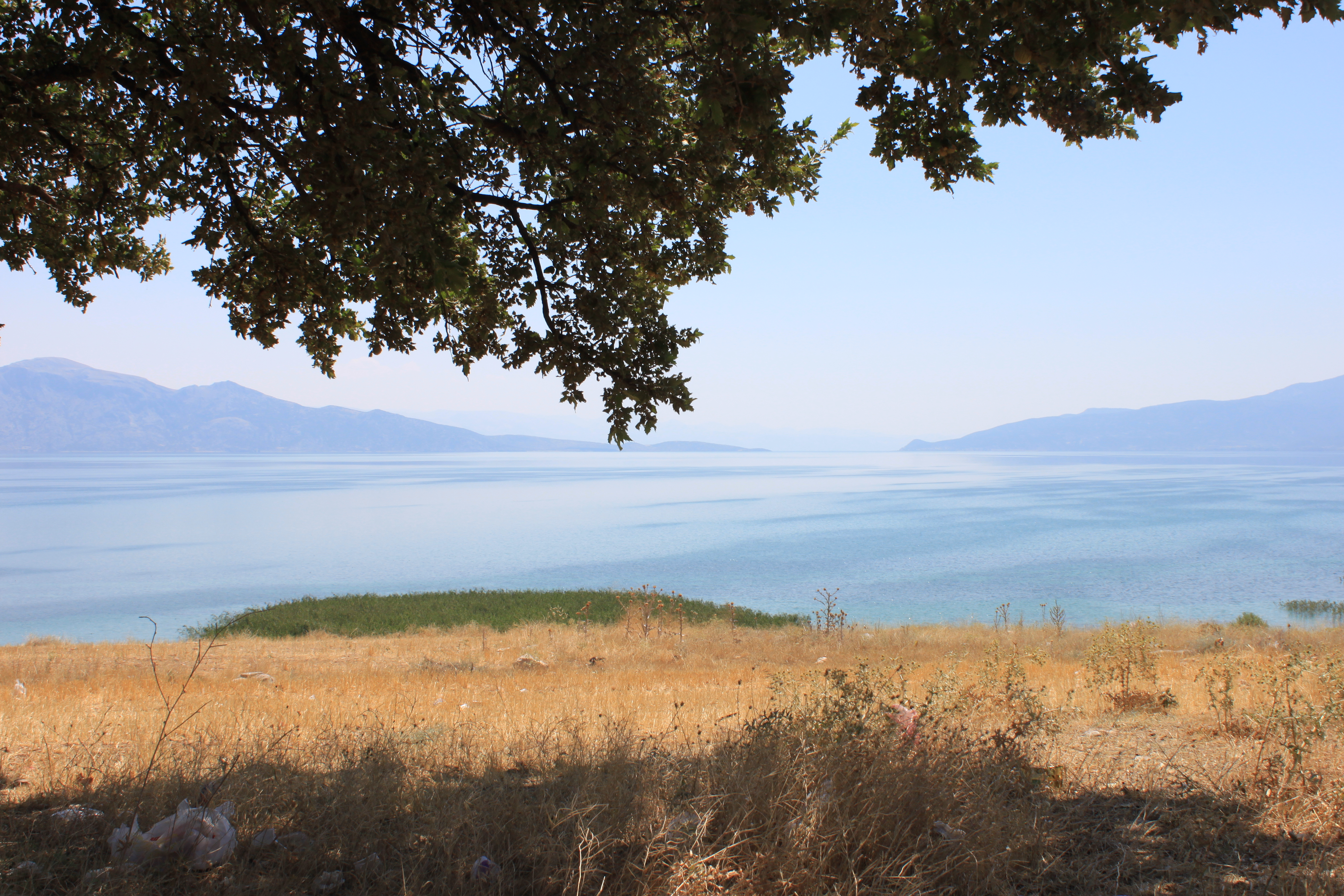 Die nördliche Hälfte des Eğirdir-Sees wird Hoyran Gölü genannt.